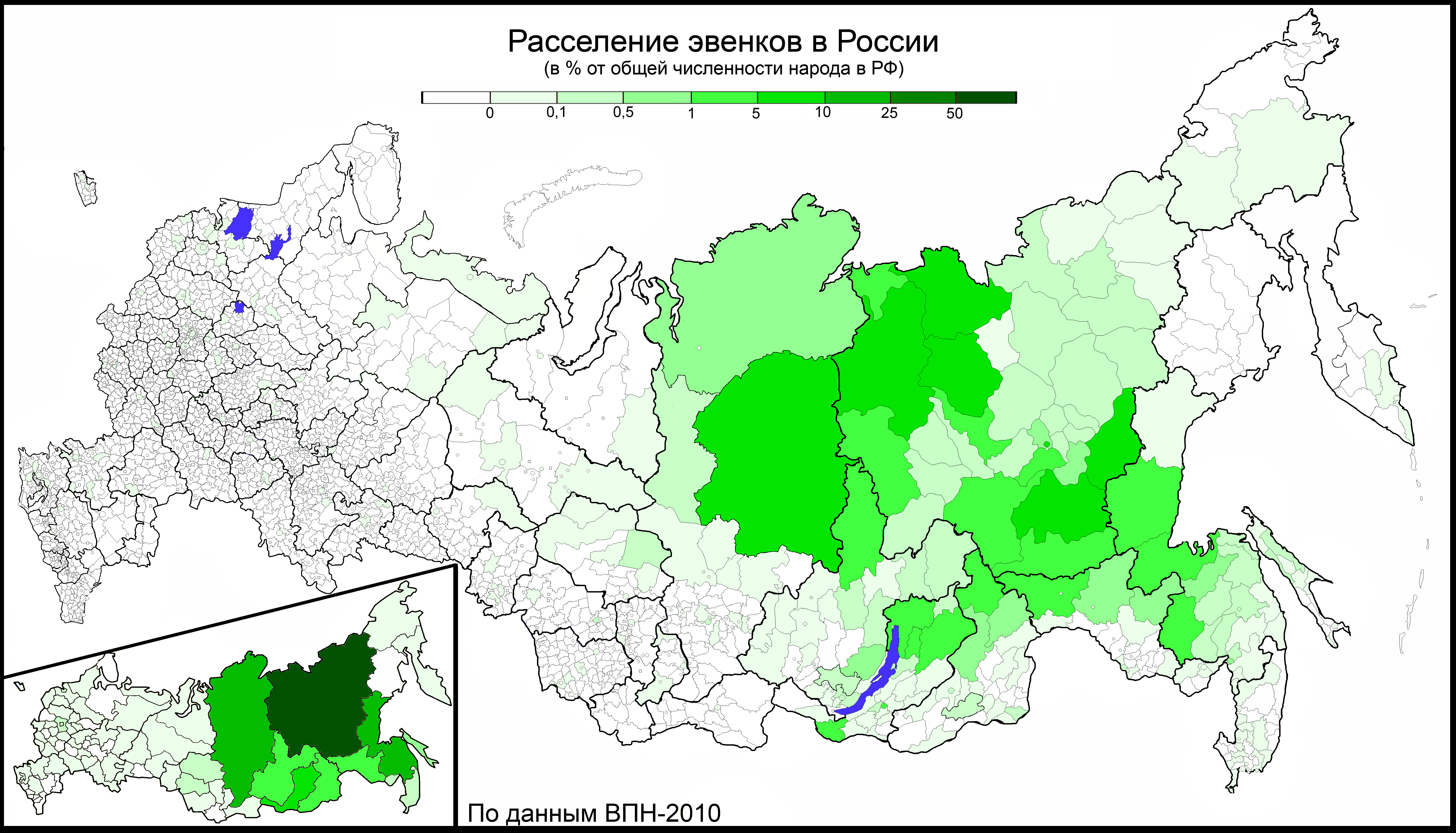 Расселение эвенков в России по муниципальным районам и городским округам в % от общей численности этого народа в РФ. По переписи 2010 года